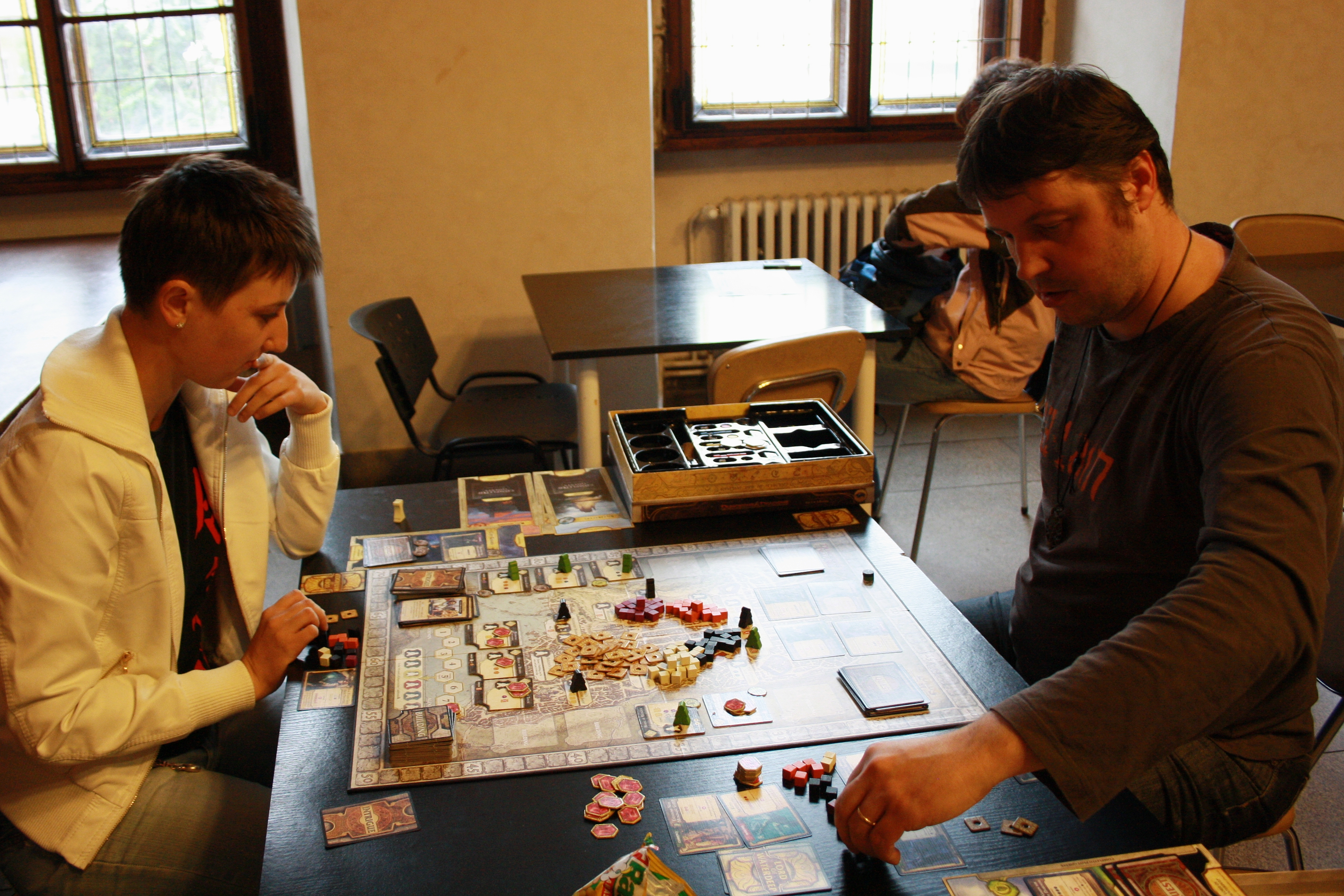 Deskohraní 2012 - Lords of Waterdeep